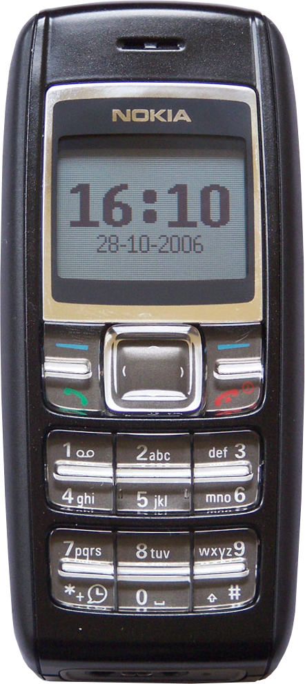 Nokia 1600